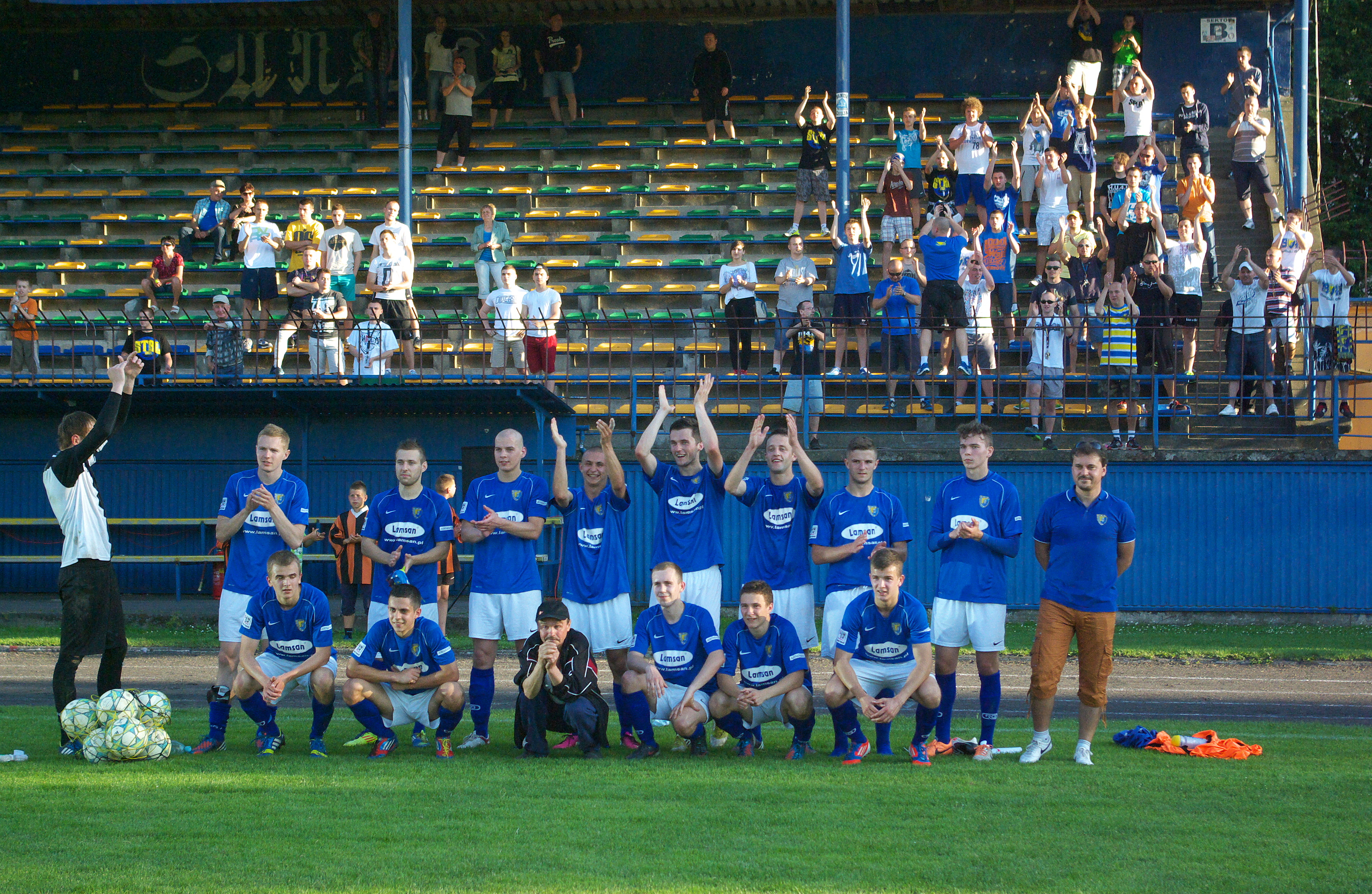 Drużyna Stali Sanok po sezonie 2013/2014